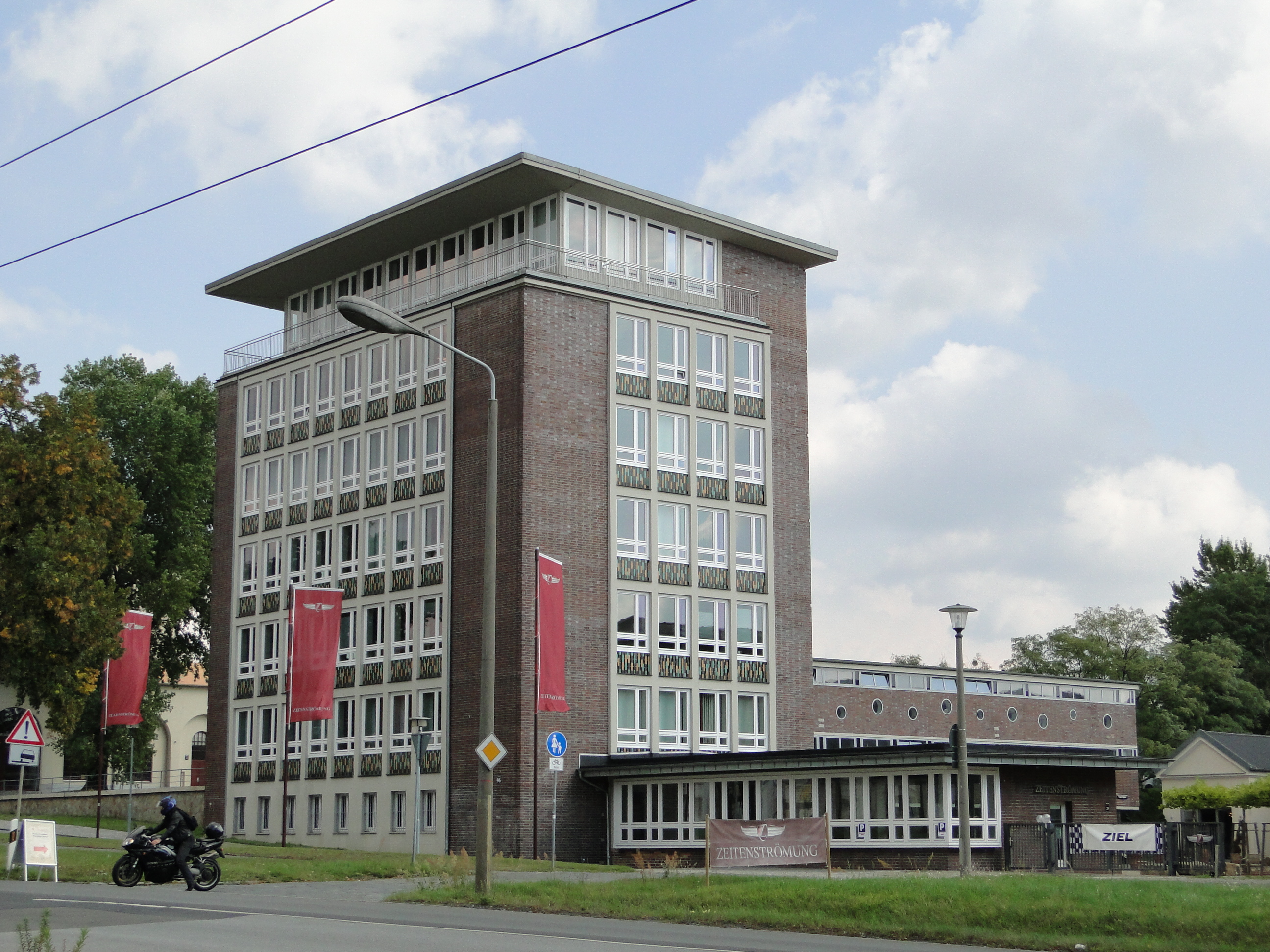 Kulturdenkmal Königsbrücker Straße 96 Dresden